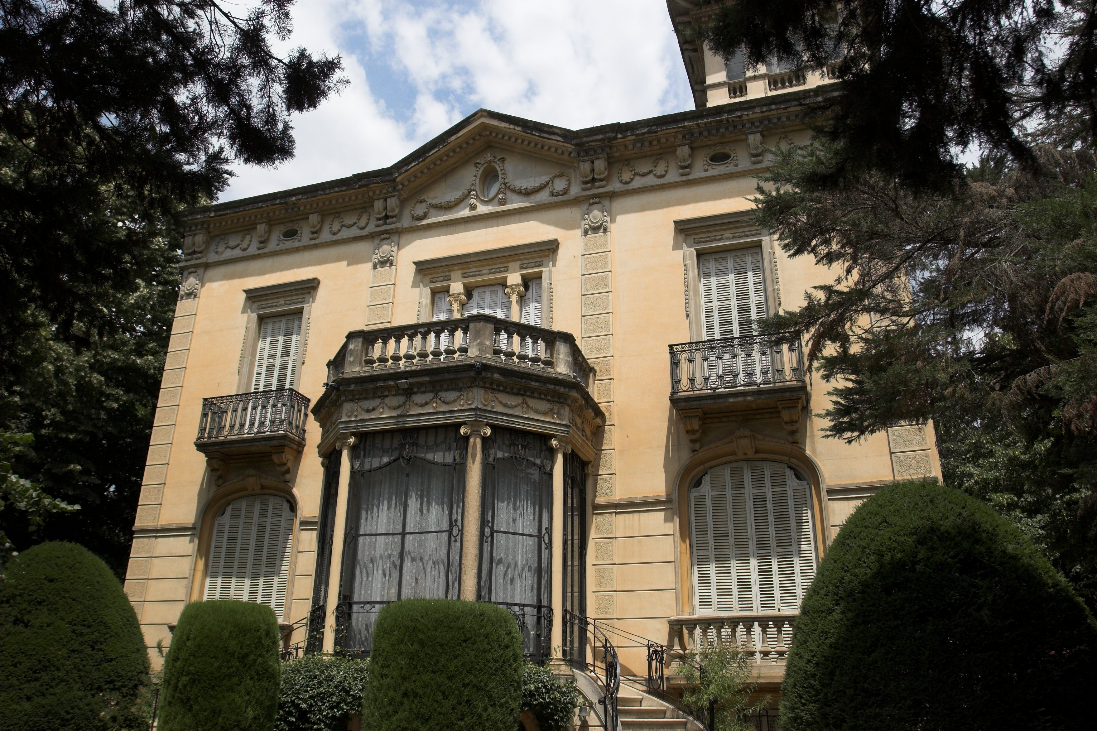 Torre Amat (Cardedeu)